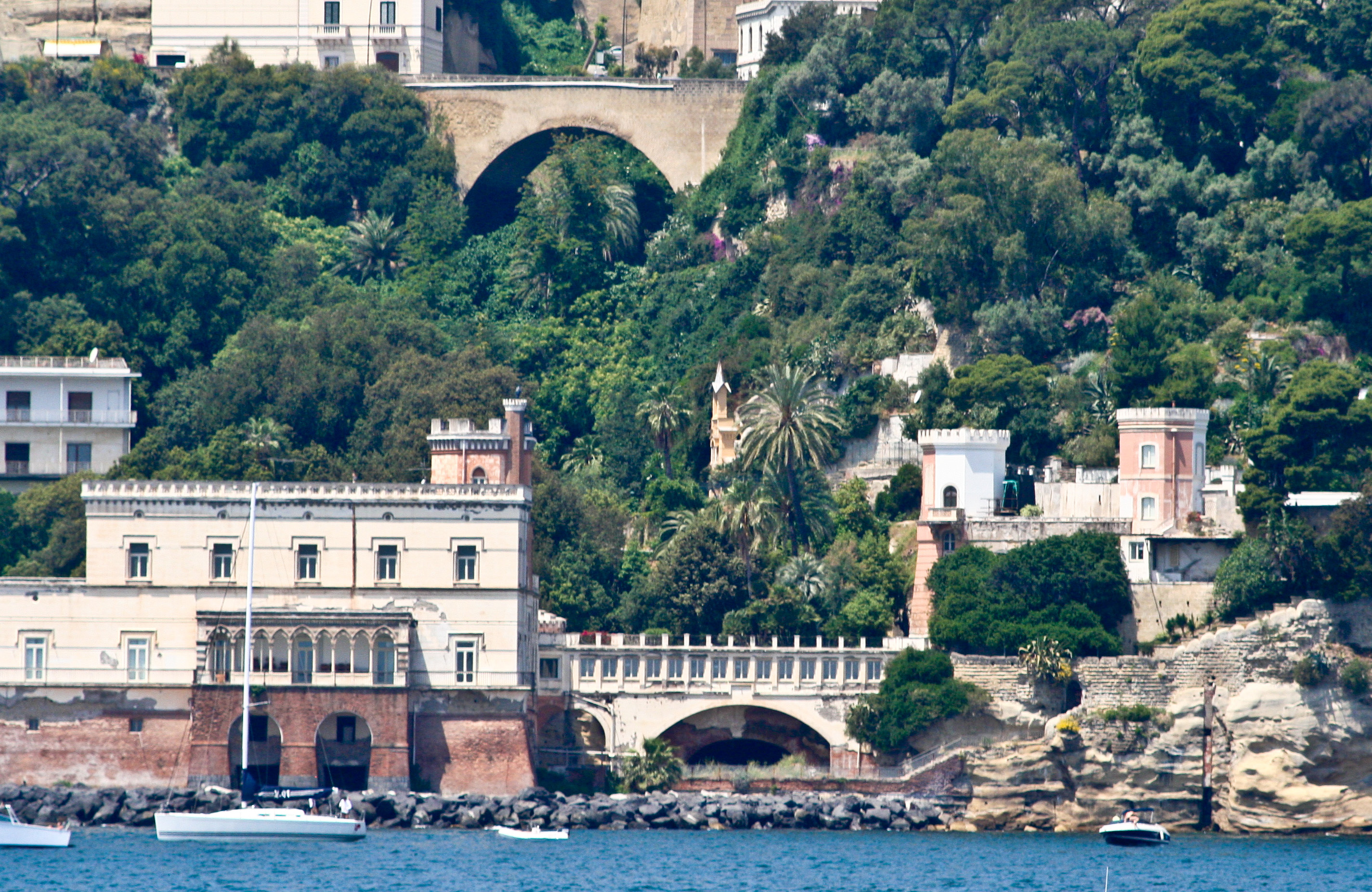 Villa Pierce